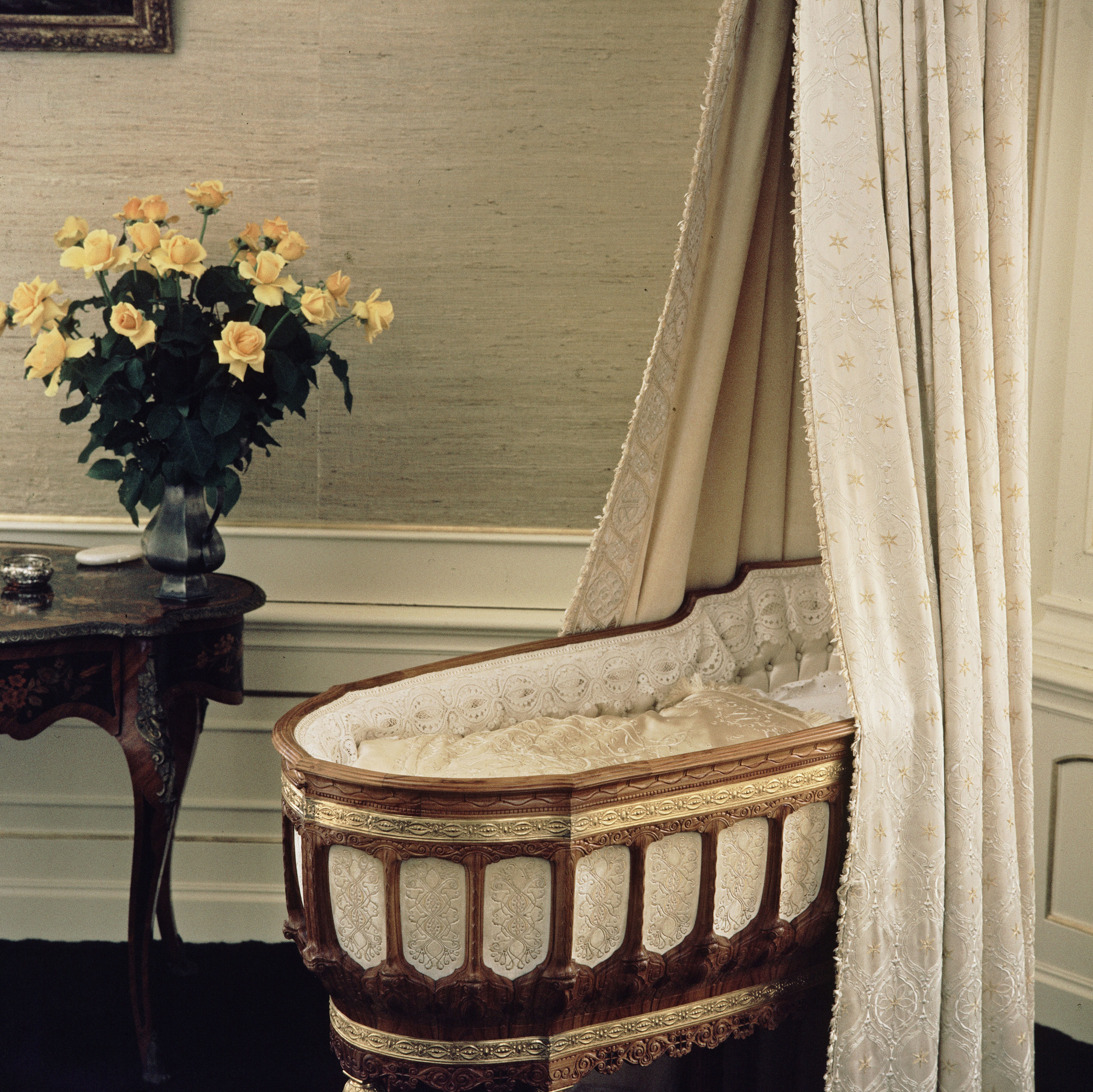 Detailopname van de Amsterdamse wieg